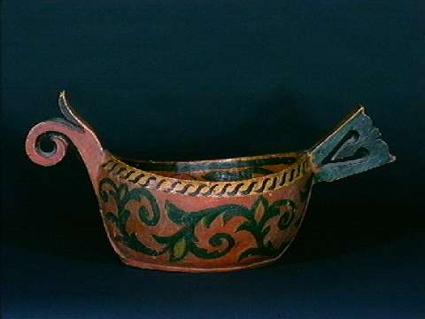 Kane, datert 1766, fra Tinn I Telemark. Lengde 48 cm. Norsk Folkemuseum, NF.1992-0278.